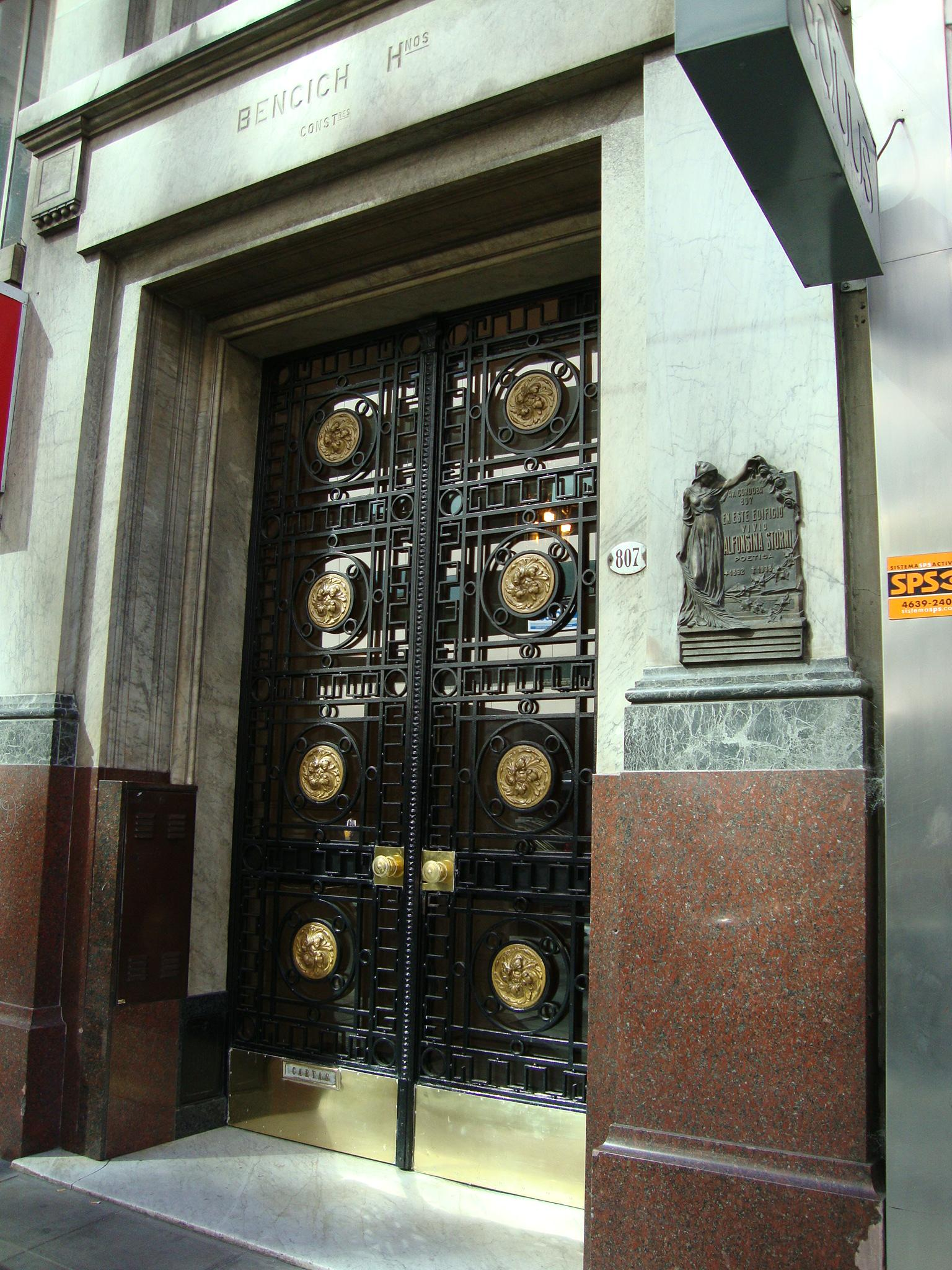 Puerta del edificio de departamentos en Avenida Córdoba nº 807, construido por Bencich Hnos. según proyecto del arquitecto Eduardo Le Monnier. En uno de sus pisos vivió la poetisa Alfonsina Storni, a la cual recuerda la placa que se ve a un costado. Buenos Aires, Argentina.